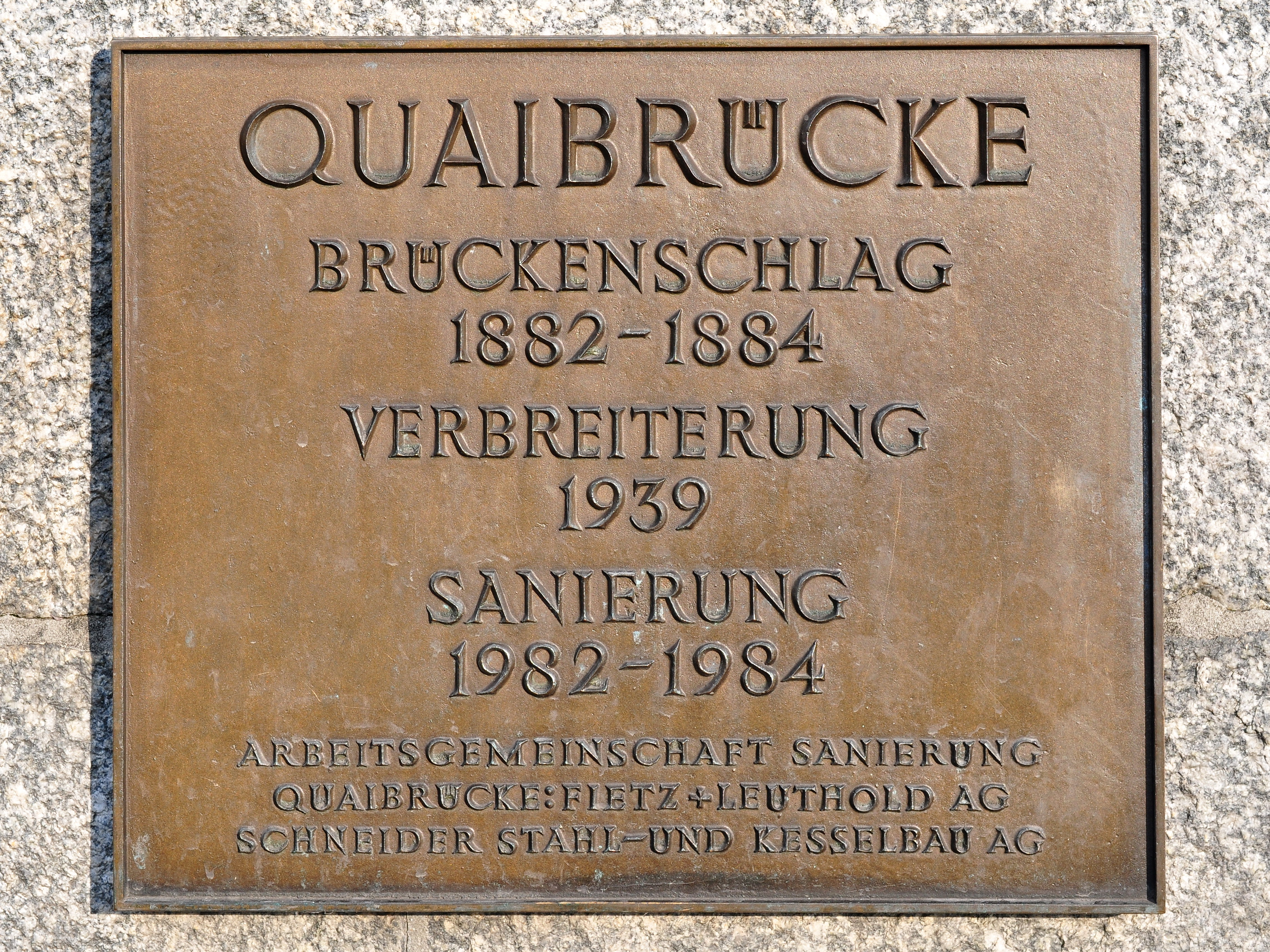 Quaibrücke in Zürich (Switzerland)